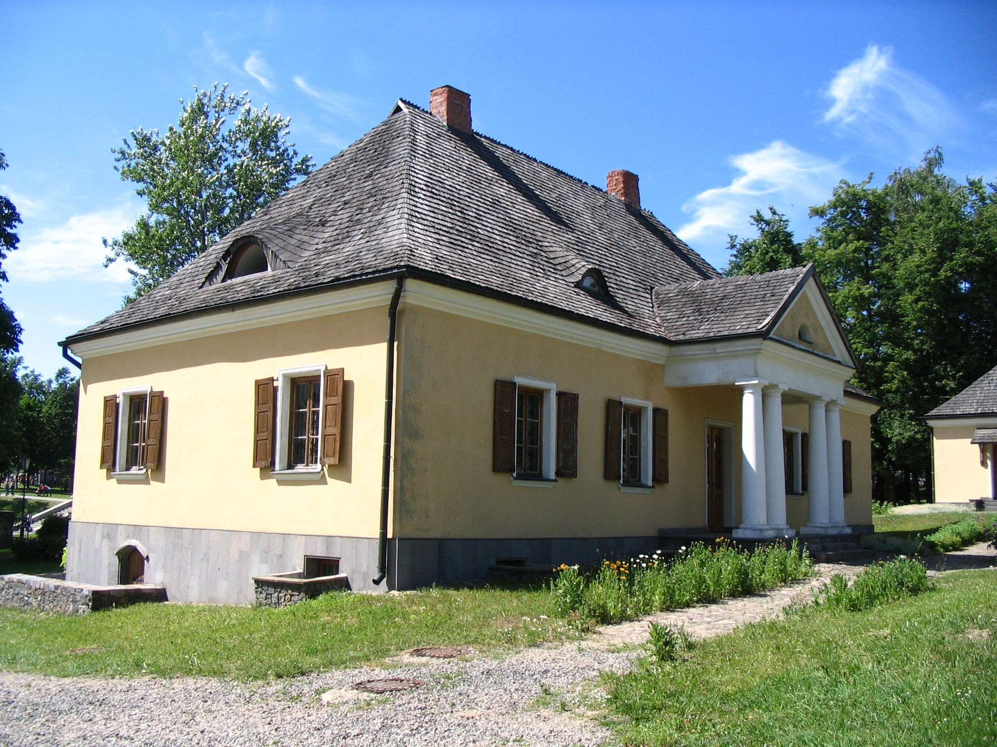 Adam Mickiewicz's house and museum, Navahrudak, Belarus